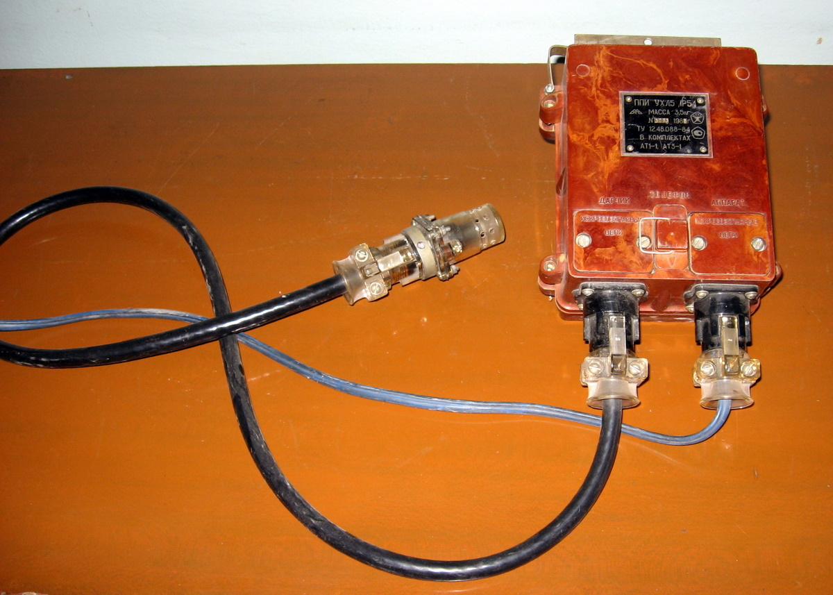 Automatic methane defence device from the complete set of AT1-1, AT3-1 ("Methane") Апаратура автоматичного газового захисту і автоматичного централізованого контролю метану з комплекту АТ1-1, АТ3-1 ("Метан"). Метанометр.